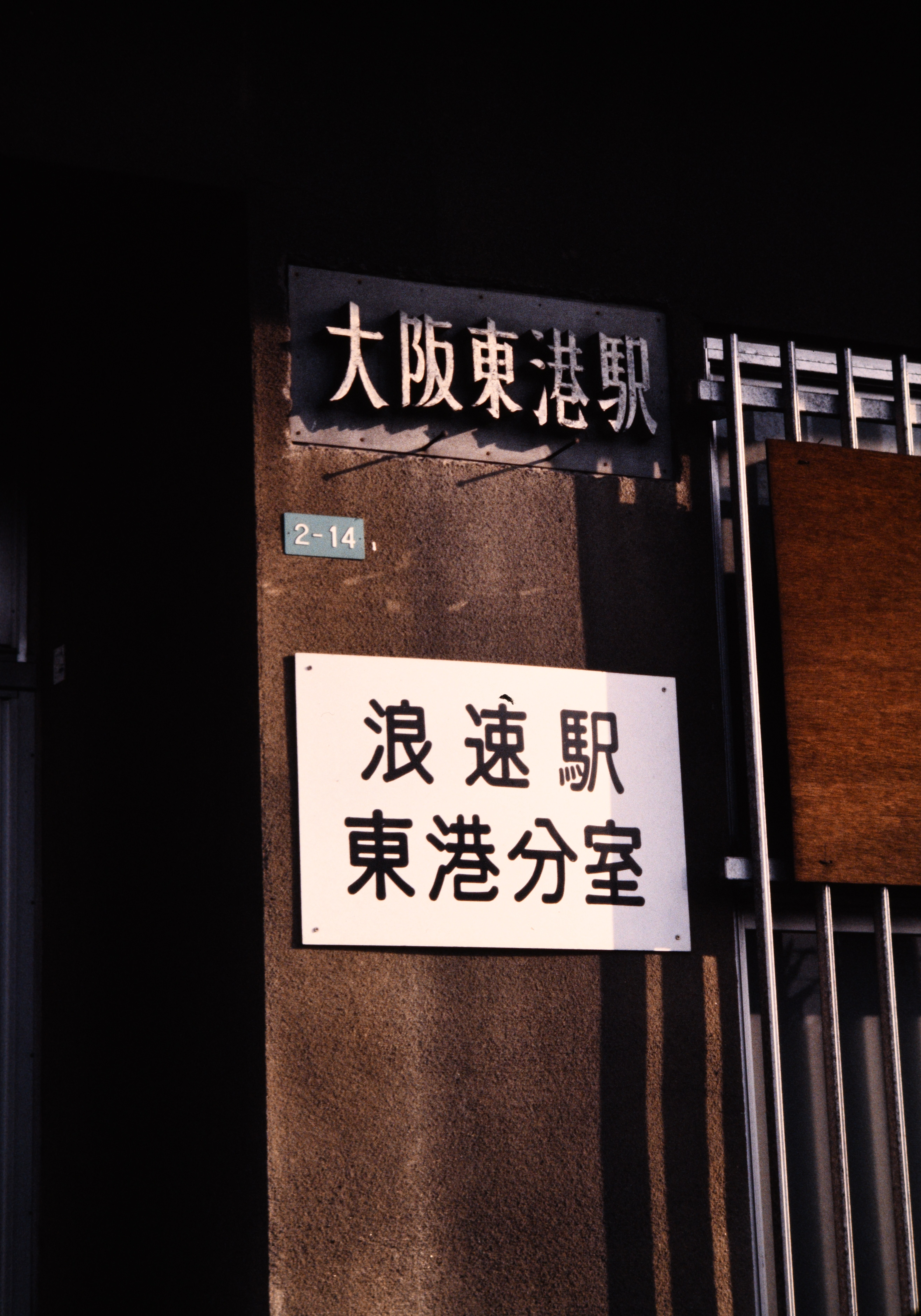 日本国有鉄道大阪環状線貨物支線・旧大阪東港駅の駅名標記(1986年)